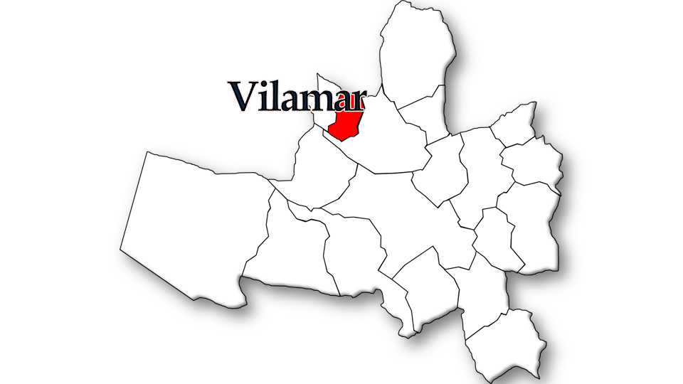 População